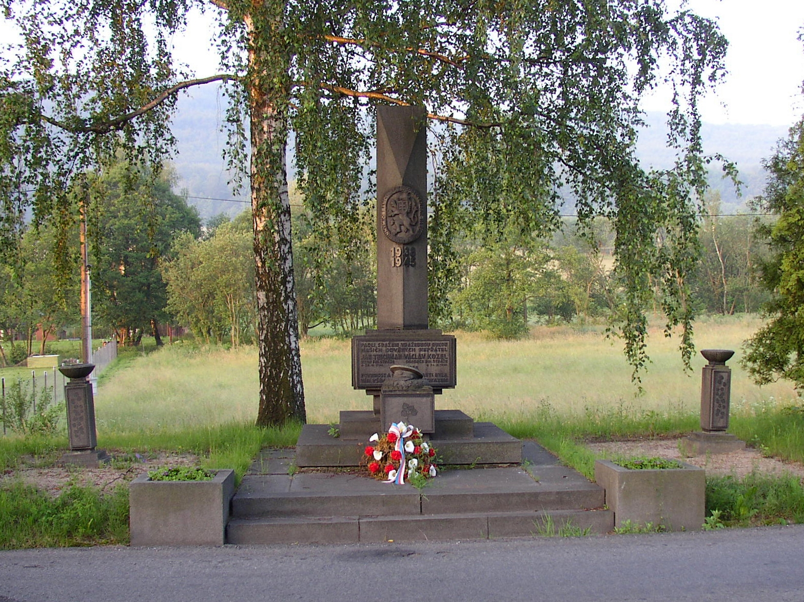 Památník příslušníků finanční stráže, Dolní Podluží, okres Děčín, Česká republika. Pomník příslušníků finanční stráže Jana Teichmanna a Václava Kozla, kteří padli 22. září 1938 při přestřelce s henleinovci. Pomník byl odhalen v září 1945. Sloup ve středu pomníku je ve tvaru československého hraničního orientačního sloupu, který byl za první republiky vztyčován na československých hraničních přechodech.